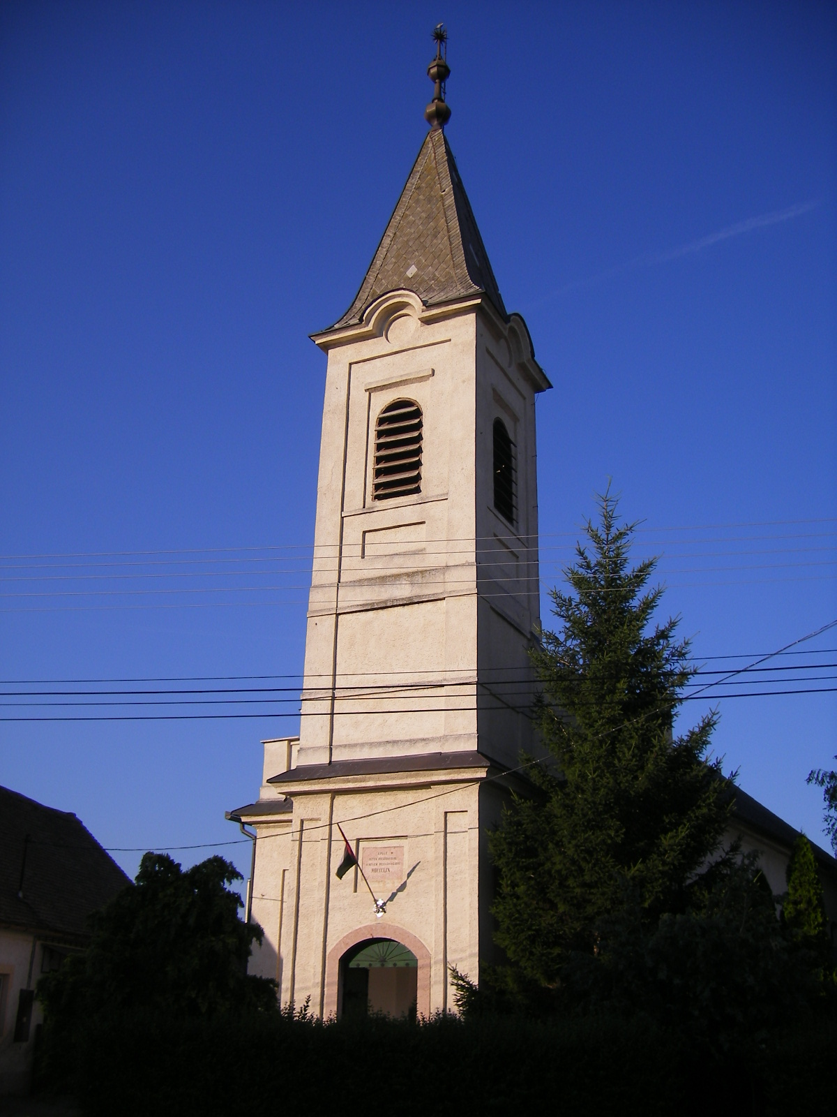 Naszály - református templom